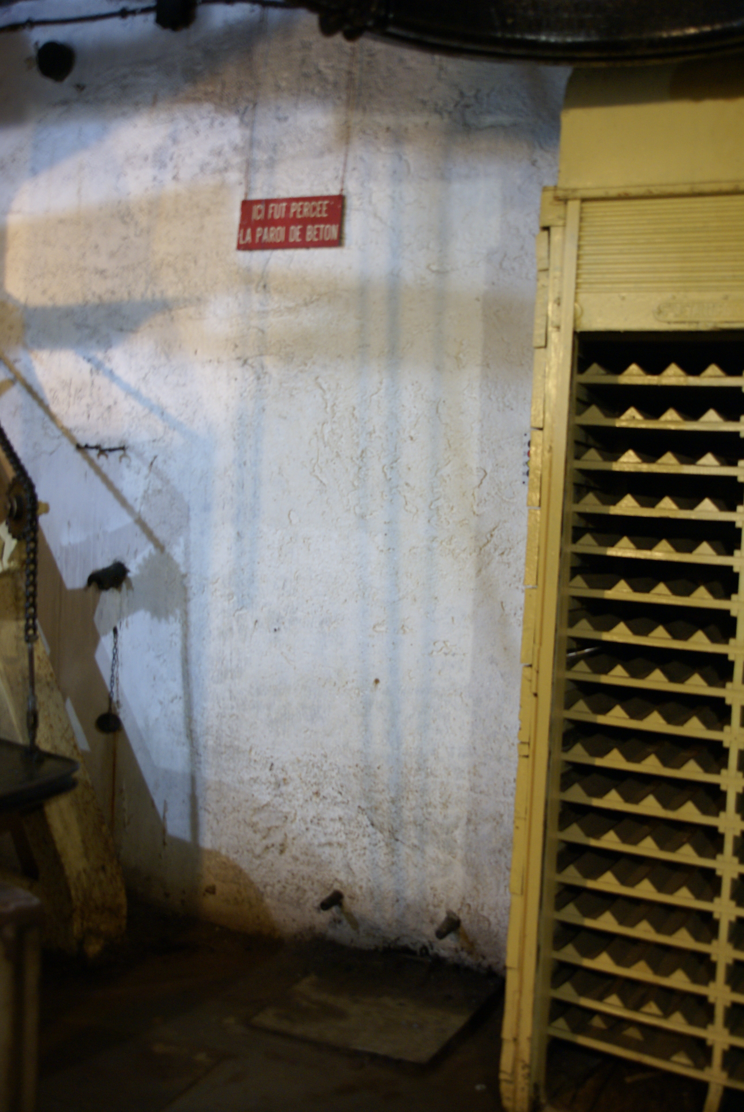 Emplacement du trou foré par les Allemands dans le mur du bloc 4 de l'ouvrage de Fermont (ligne Maginot), près de Longuyon, France.